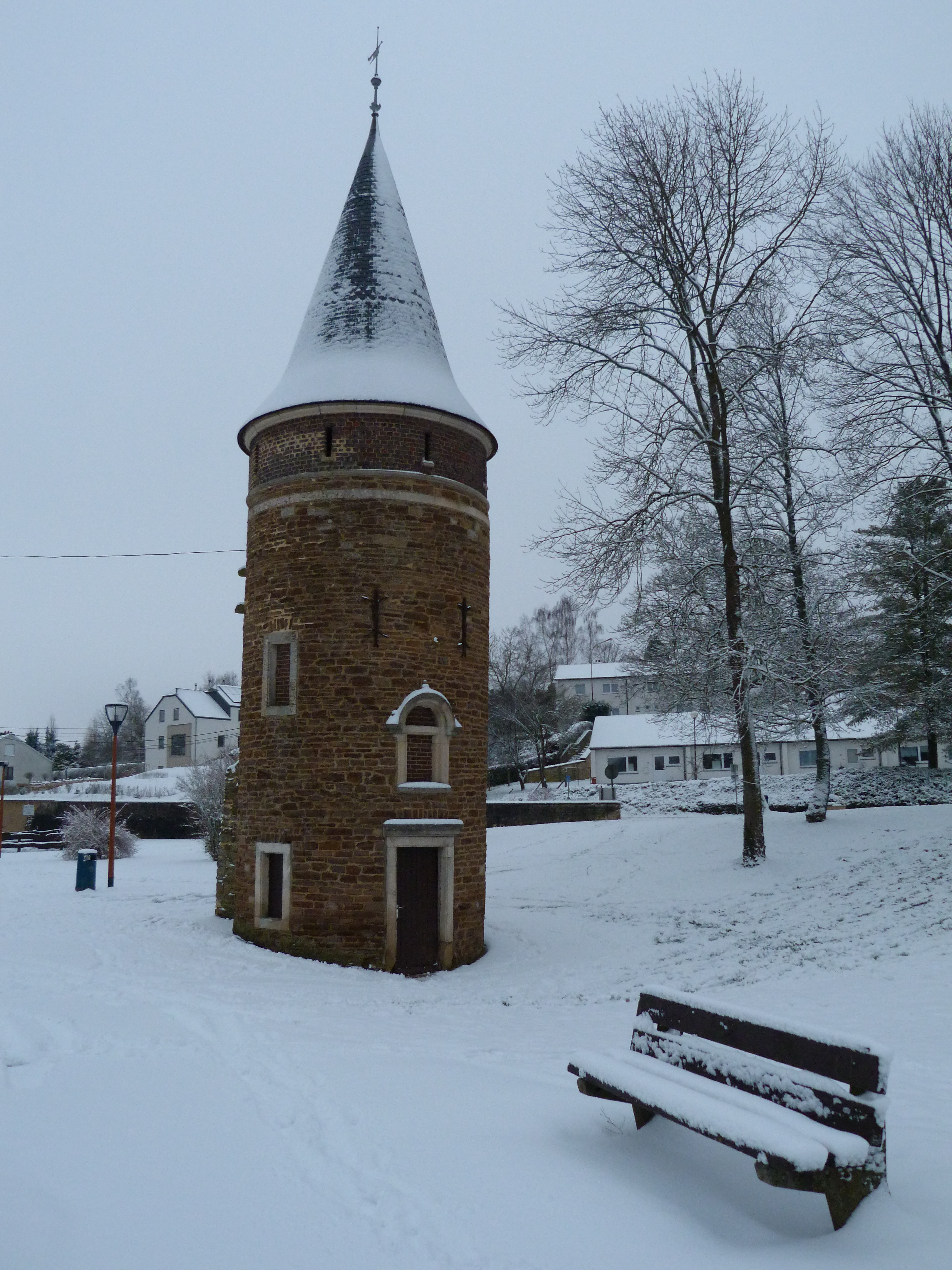 Seul vestige de l'ancien château de Messancy: les deux tours jumelles dans le parc